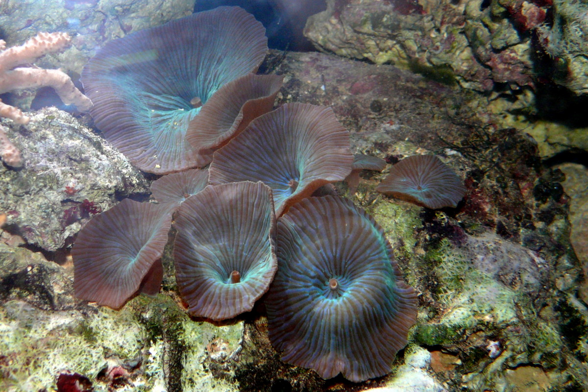 Corallimorpharia